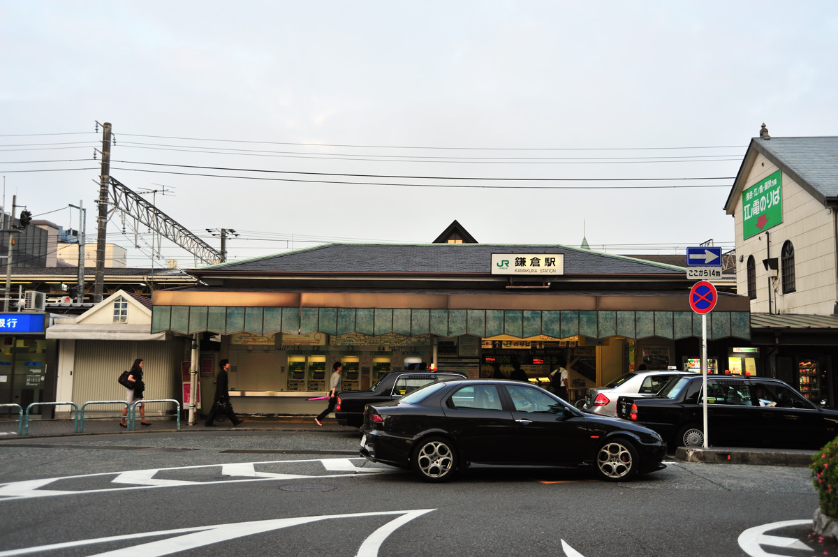 中文（台灣）: JR鎌倉車站 西口